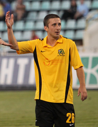 Давид Таргамадзе, півзахисник ФК «Іллічівець»